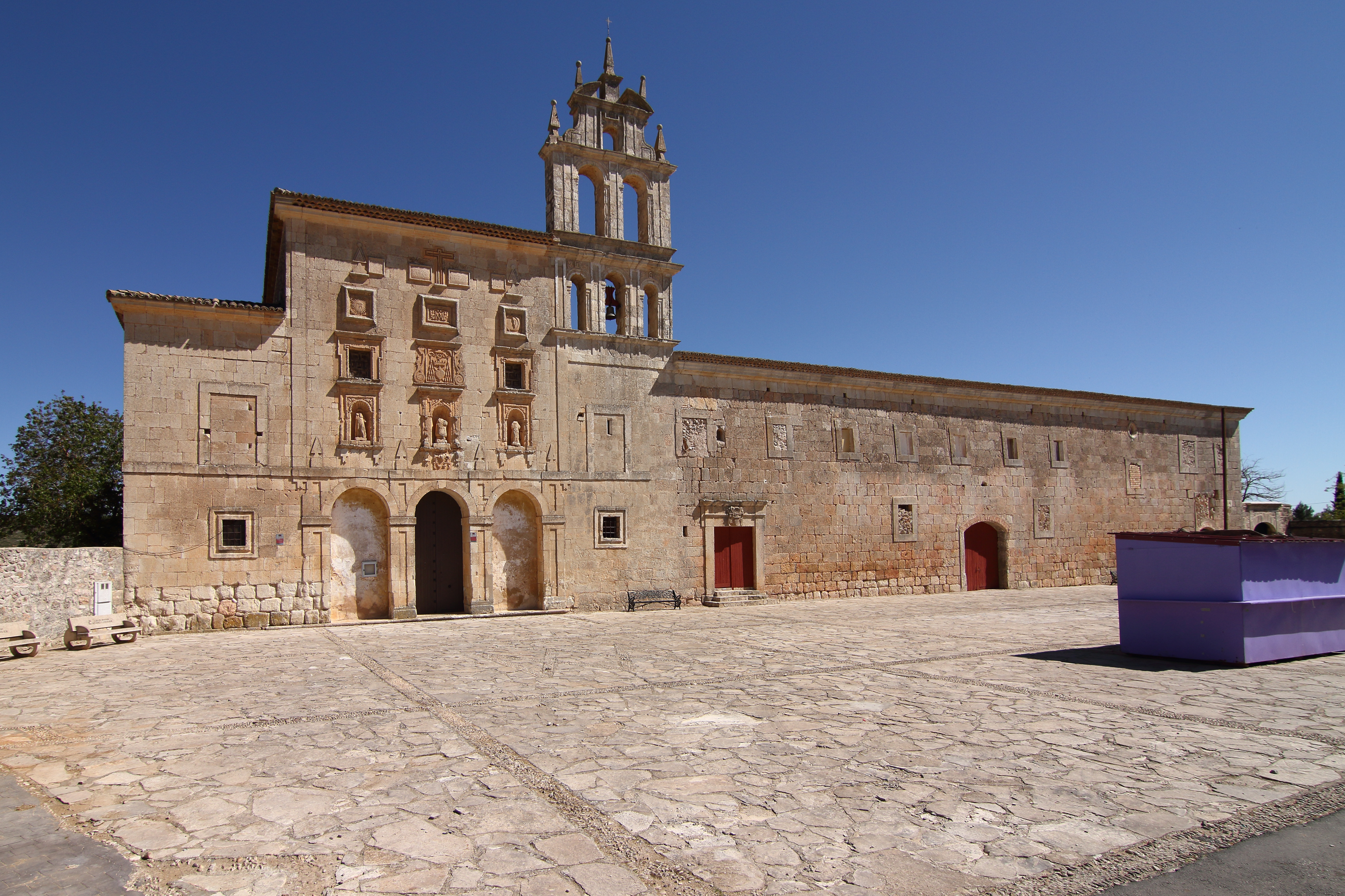 Campillo de Altobuey, Santuario de la Virgen de la Loma, fachada principal, 01